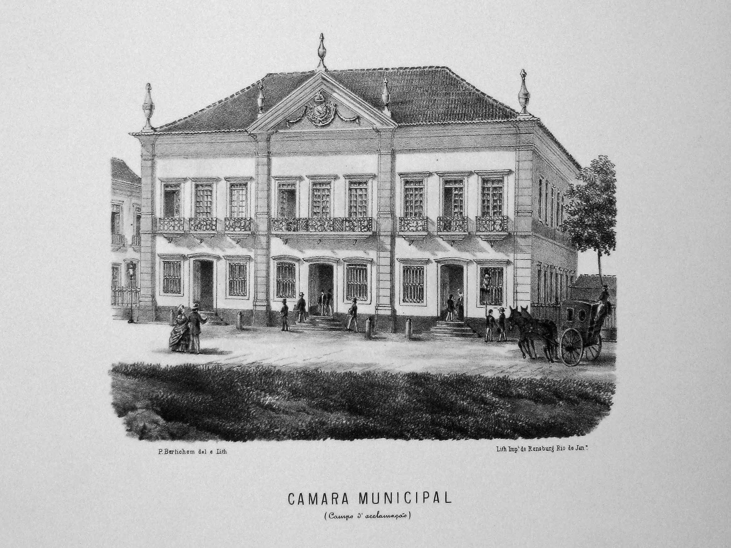 Bertichem - 1856 - Câmara Municipal no Campo da Aclamação (Campo de Santana ou Praça da República)